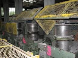 Trefiladora Multiple